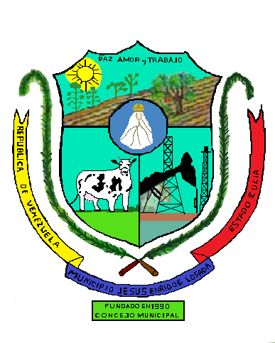 Escudo del municipio Jesús Enrique Losada, estado Zulia, Venezuela